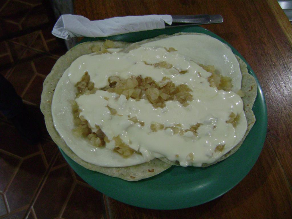 Quesillo de Nagarote, Plato típico de la ciudad.